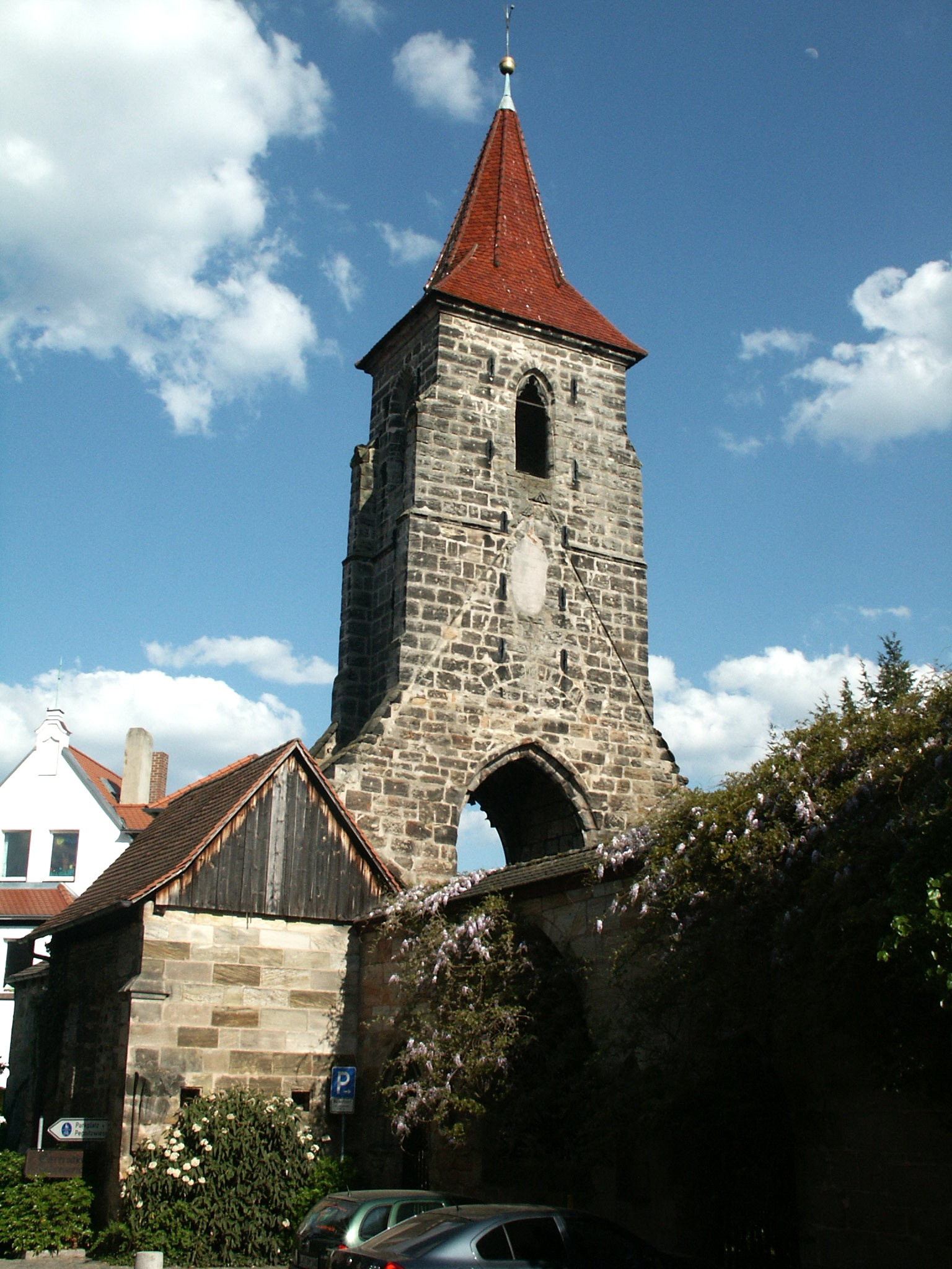 Ruine der Sankt-Leonhardskirche in Lauf an der Pegnitz